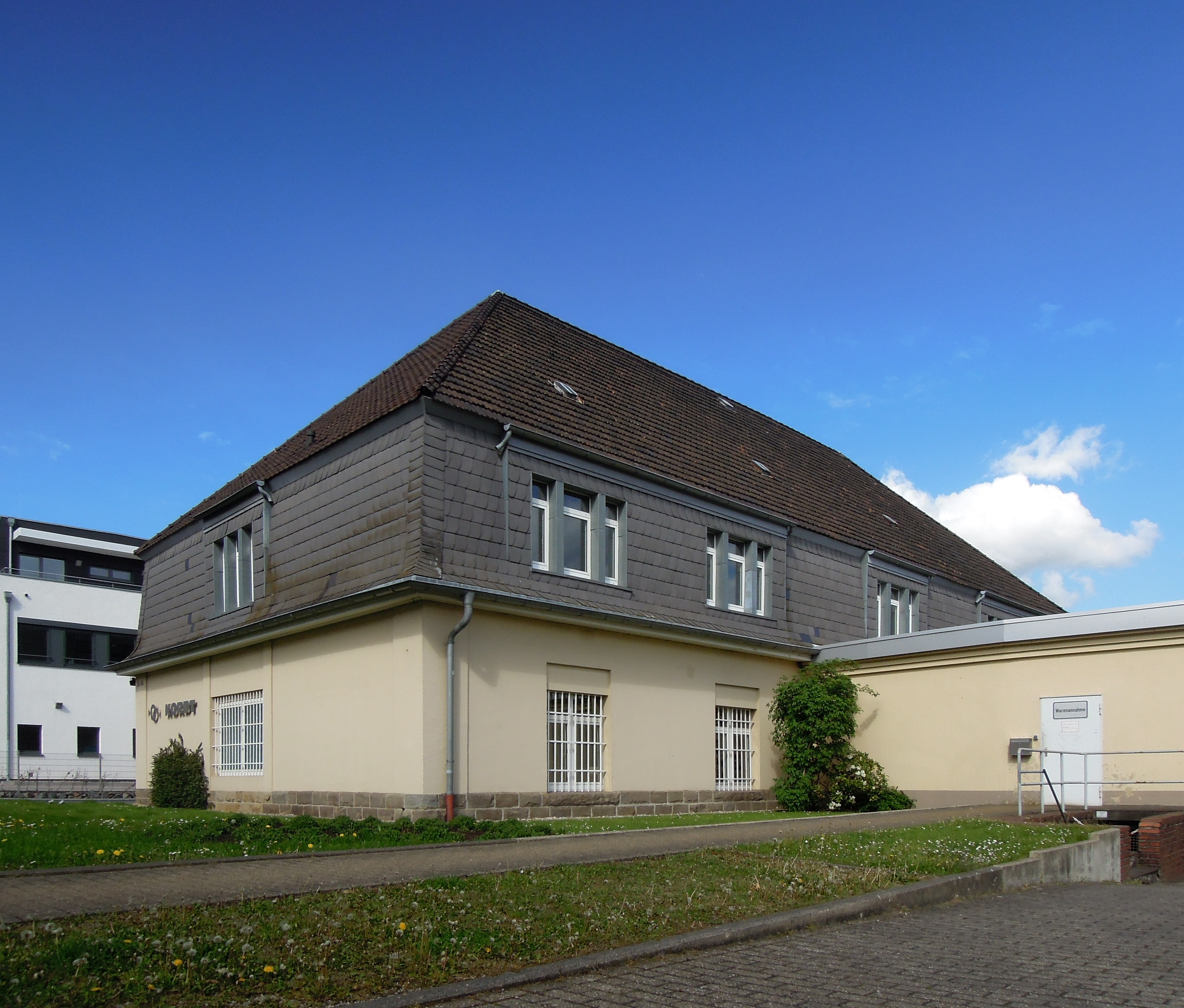 Gelände der ehemaligen Infanterie-Kaserne Eschweiler